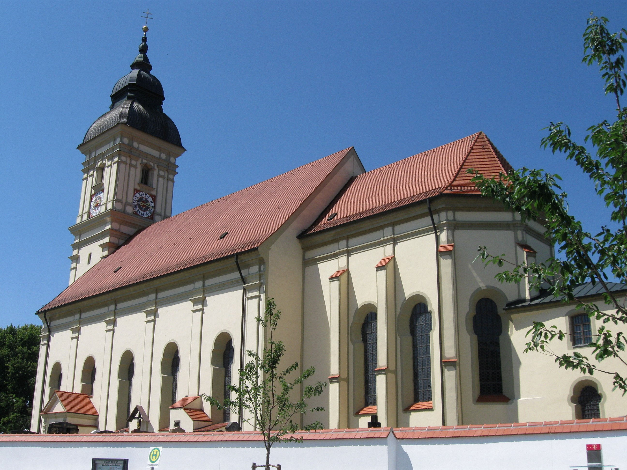 Kath. Pfarrkirche St. Mariae Verkündigung, Altenerding, stattlicher Bau von Anton Kogler, 1724; mit Ausstattung.